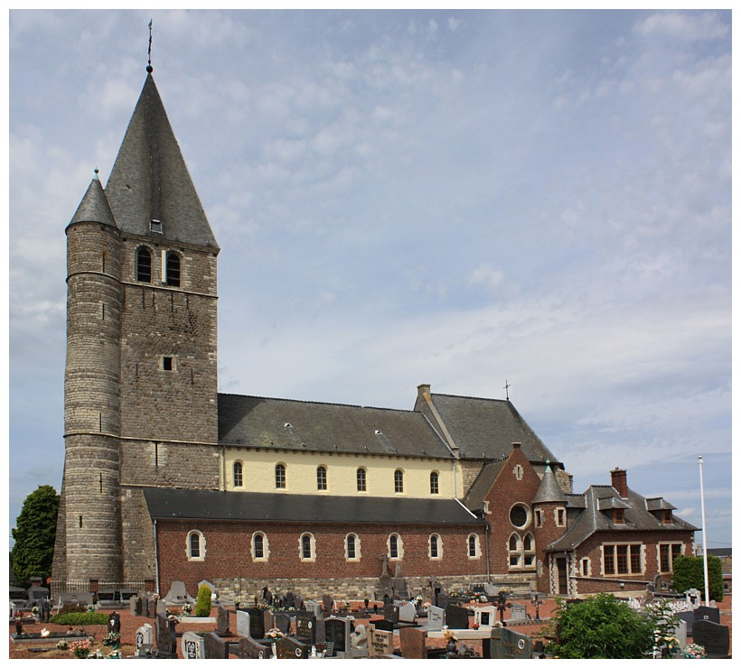 Parochiekerk Sint-Laurentius van Goetsenhoven